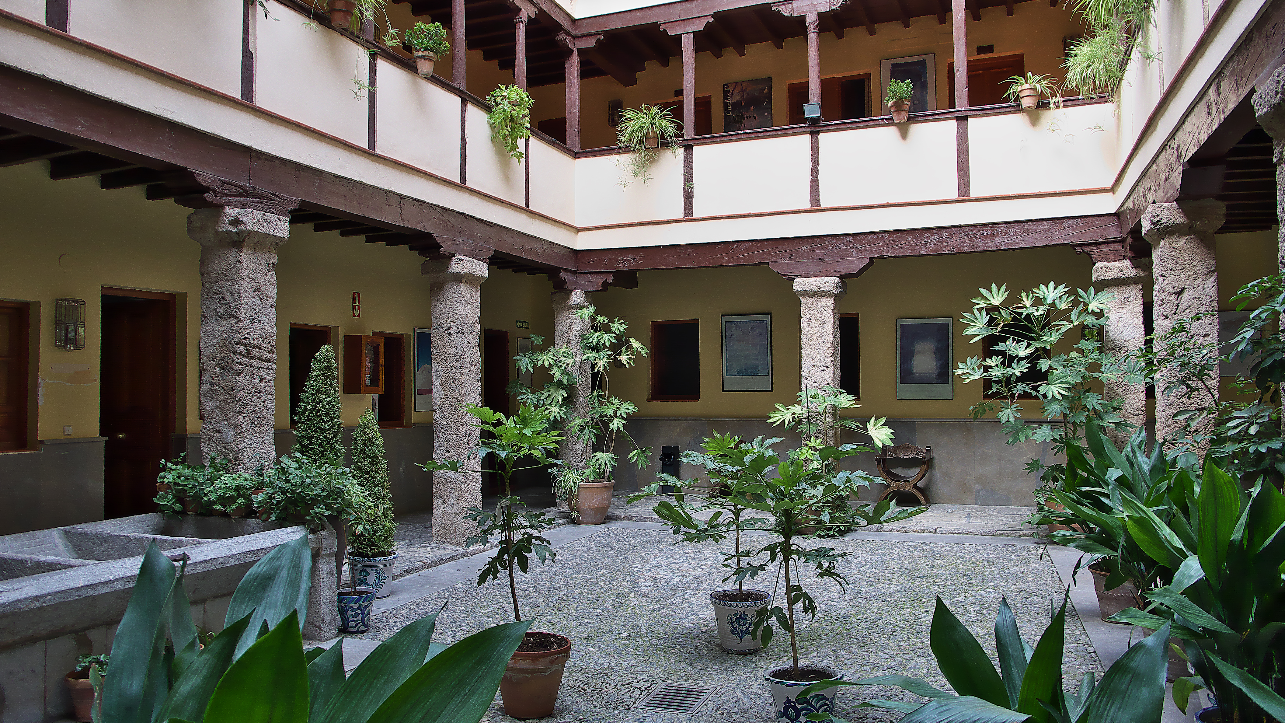 Patio reprentativo de la arquitectura granadina de siglos pasados.